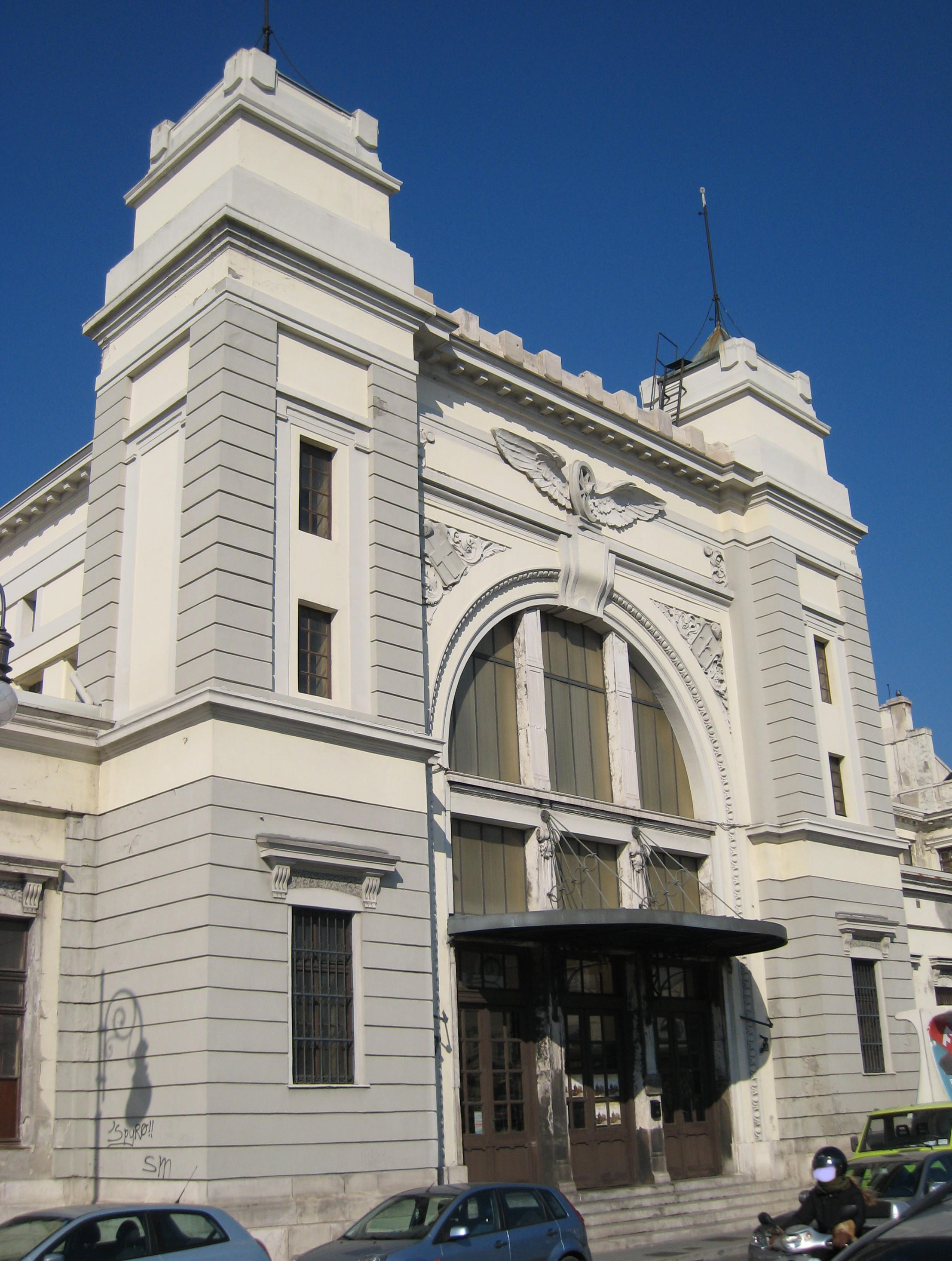 La sede del museo ferroviario di Trieste. Febbraio 2008